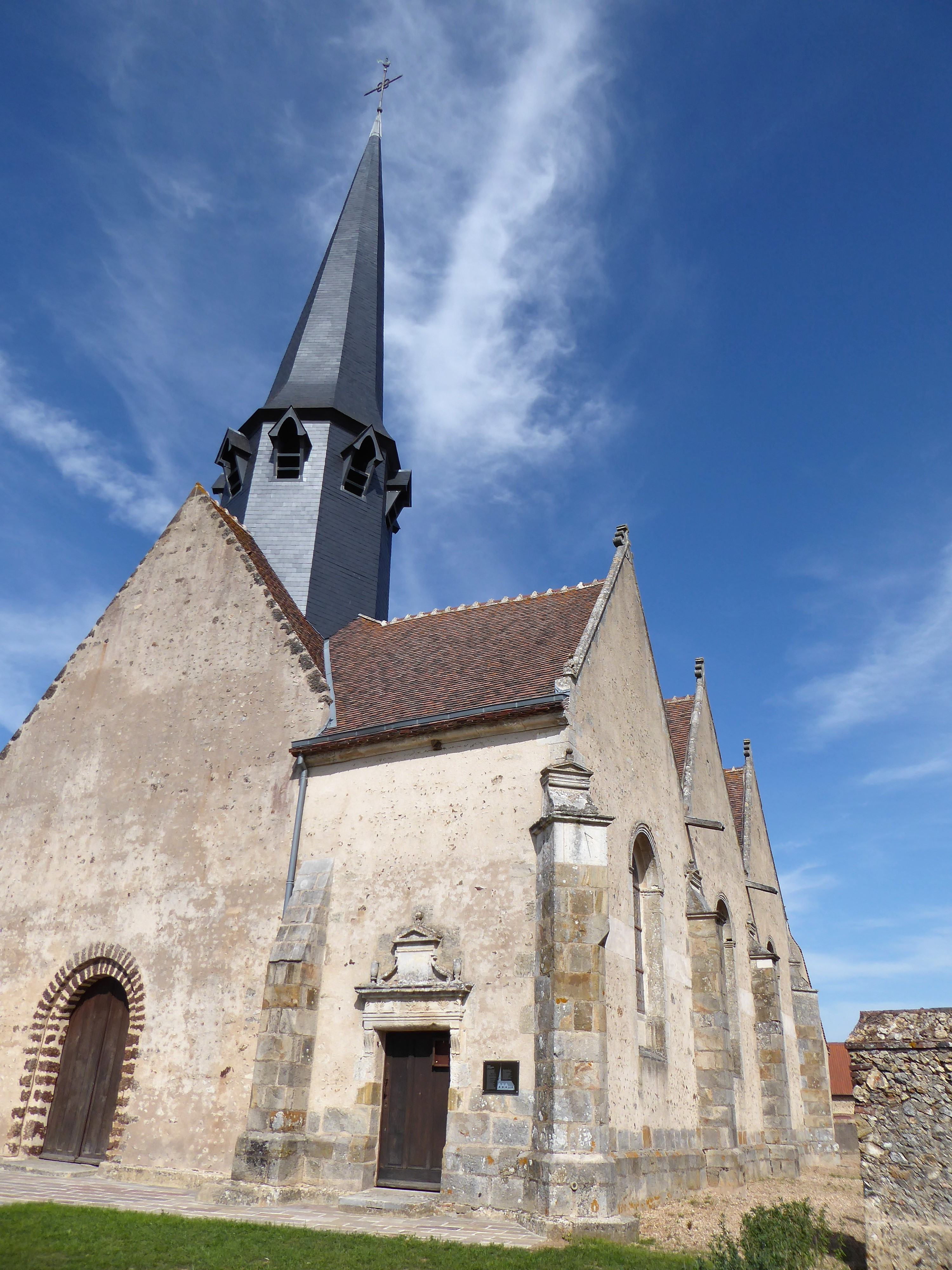 église Saint-Martin de Beauche, Eure-et-Loir, France.